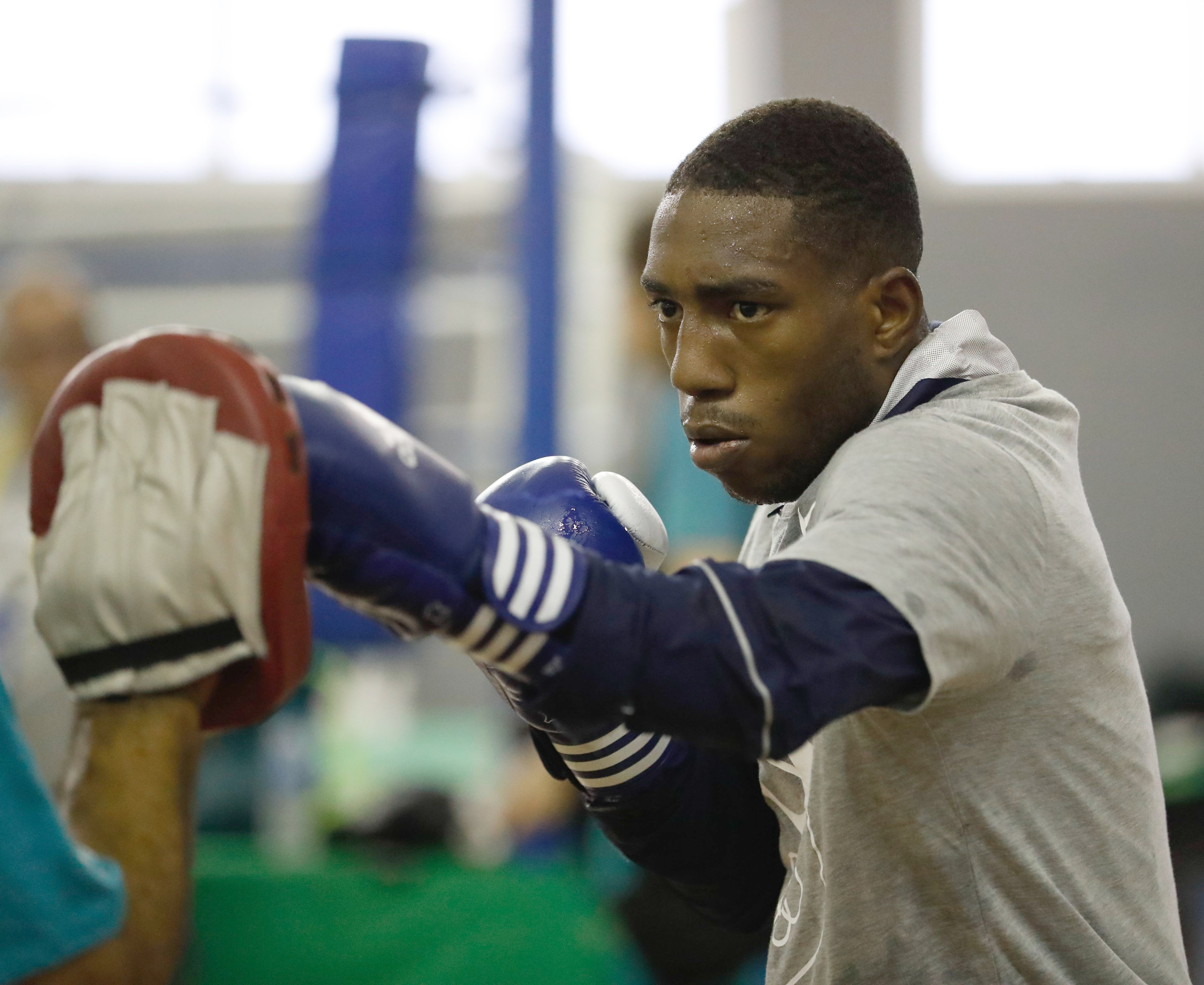 Rio de Janeiro - Joedson Teixeira, atleta da seleção brasileira de boxe, durante treino para os Jogos Olímpicos Rio 2016 na base do Time Brasil, na Urca (Fernando Frazão/Agência Brasil)